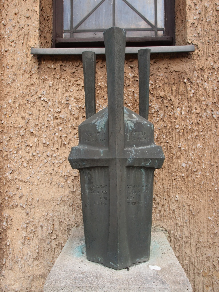 Urne des Architekten und Baubeamten Wilhelm Goette (1873-1927) auf dem Hauptfriedhof Plauen